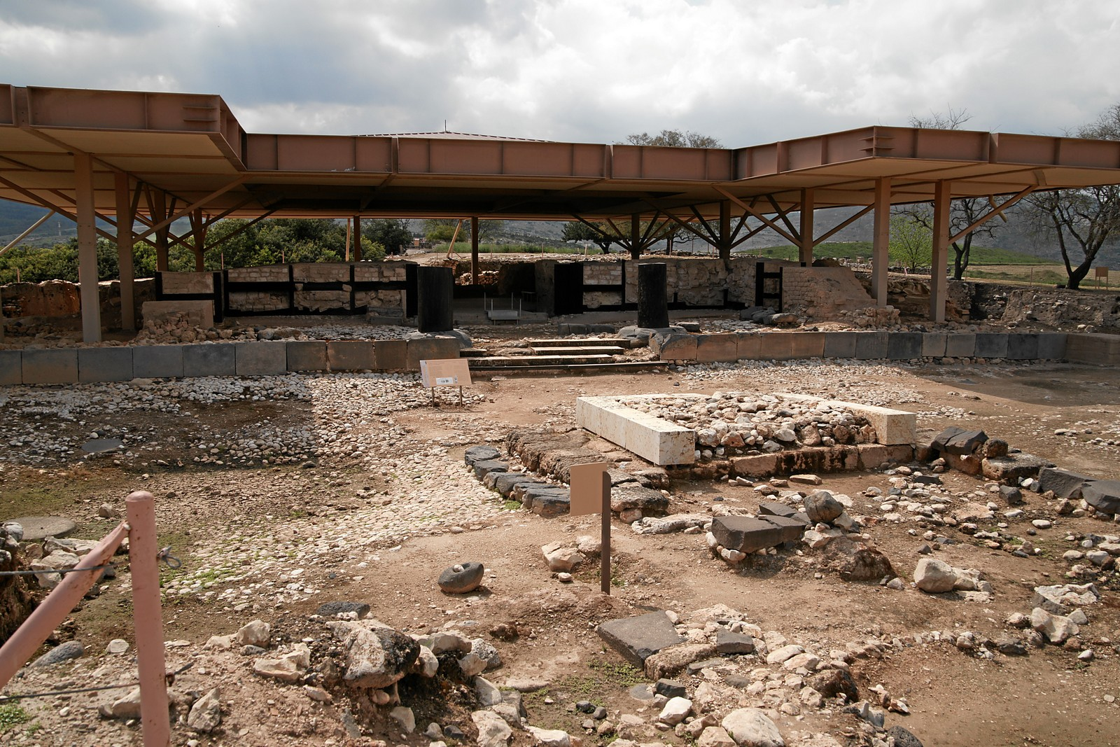 Tel Hatzor: Zeremonienpalast